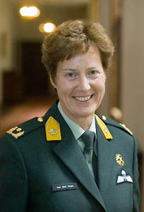 General Leanne van den Hoek (Netherlands)